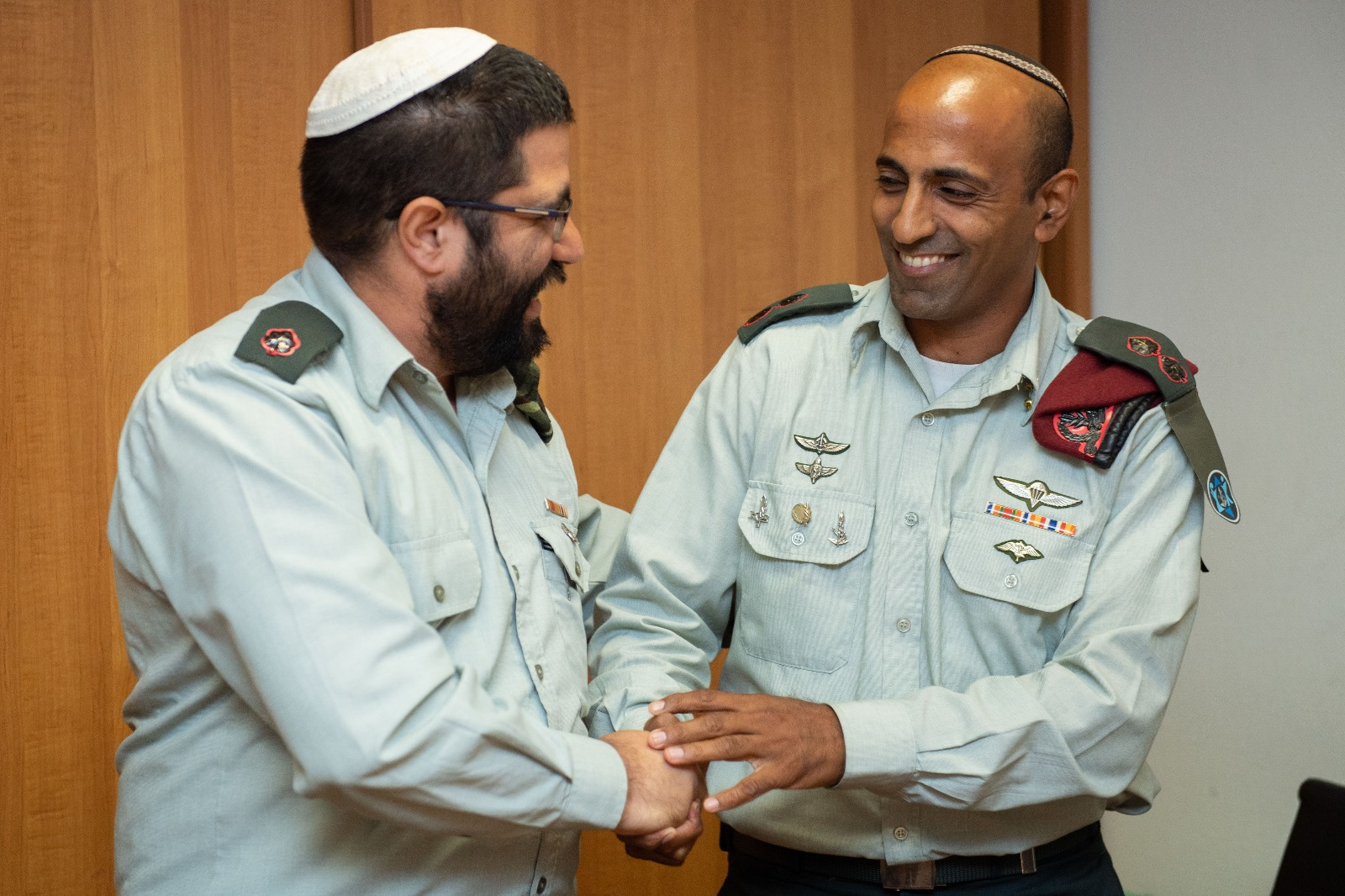 טקס חילוף מפקד מנהלת חרדים.